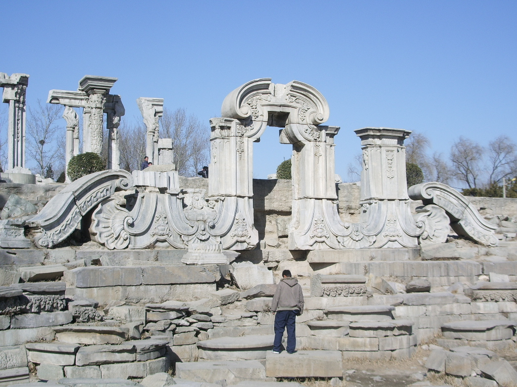 中文（中国大陆）: 西洋楼大水法与远瀛观残迹。